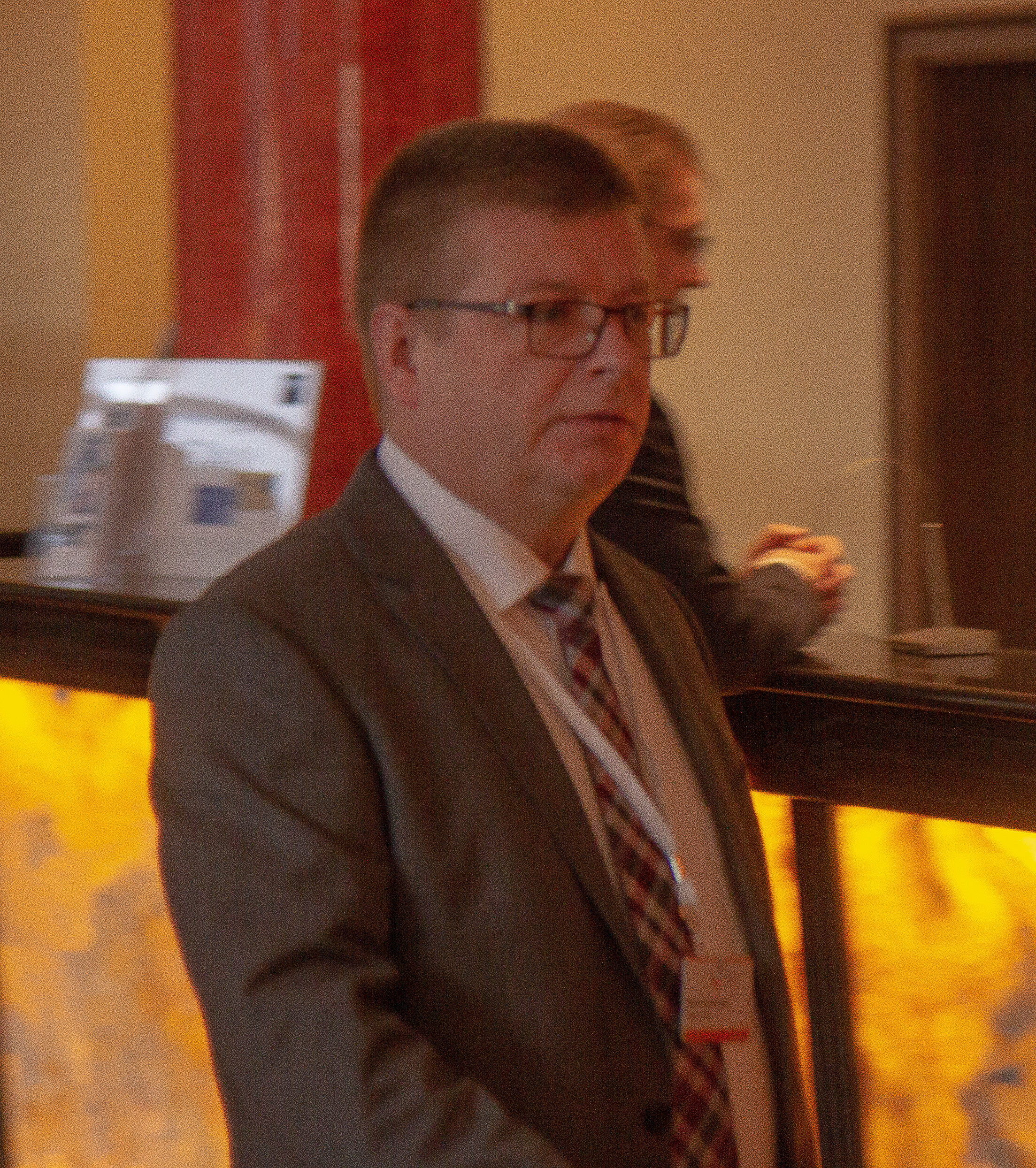 Thomas Haldenwang vor der Sitzung der 209. Innenministerkonferenz vom 28.-30. November in Magdeburg